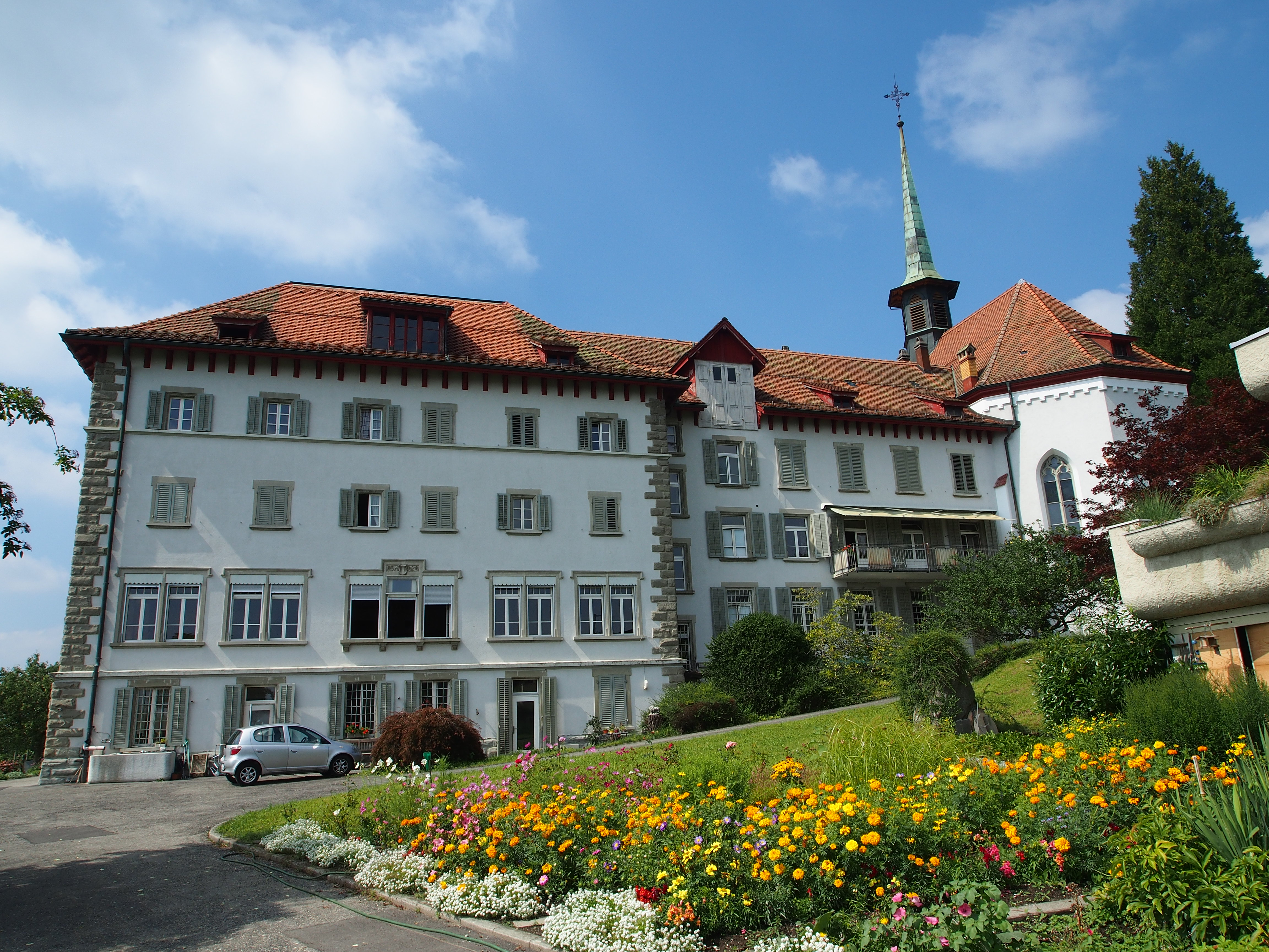 St. Anna-Frauenkloster